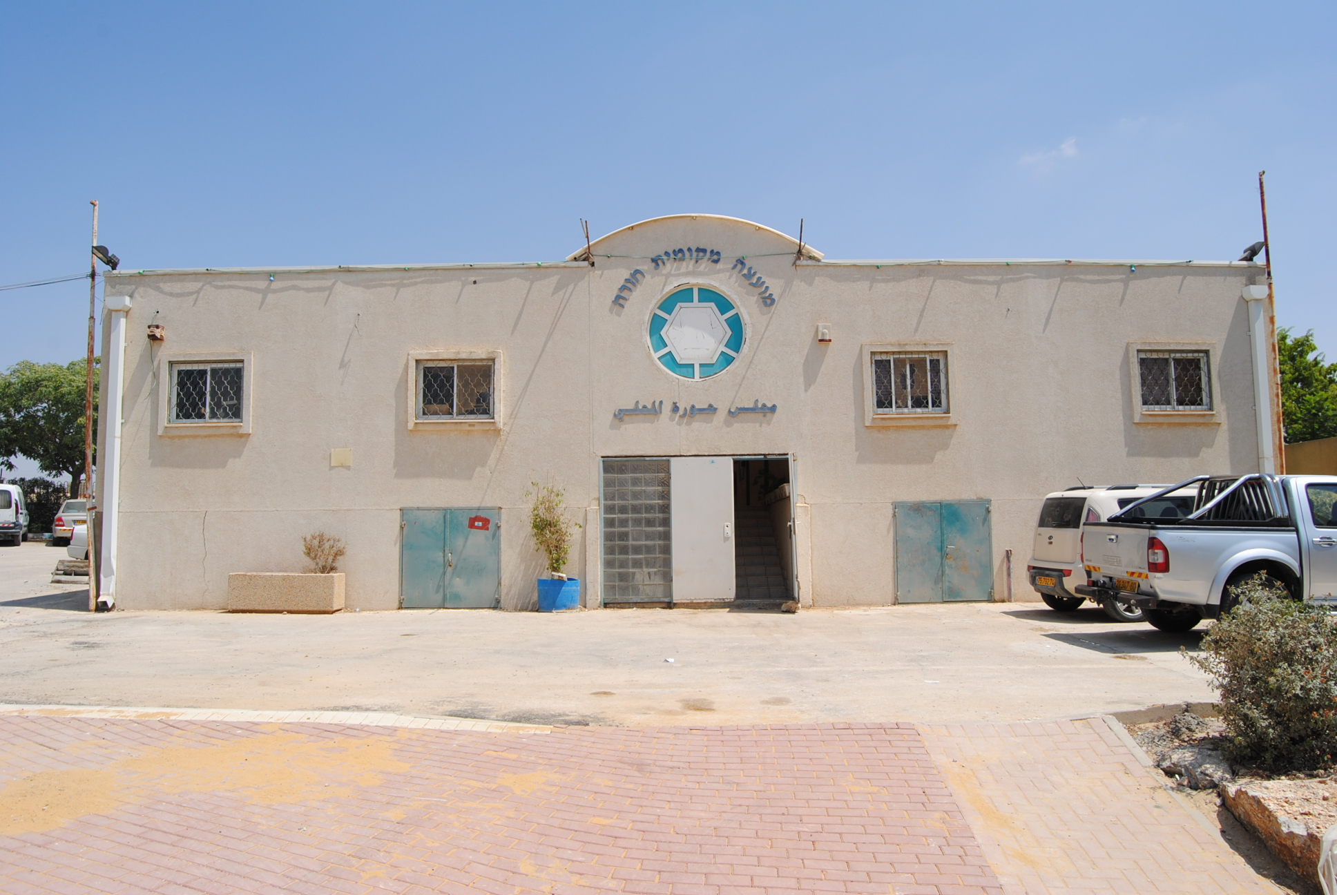 בניין המועצה שמאכלס את עובדי המועצה חורה